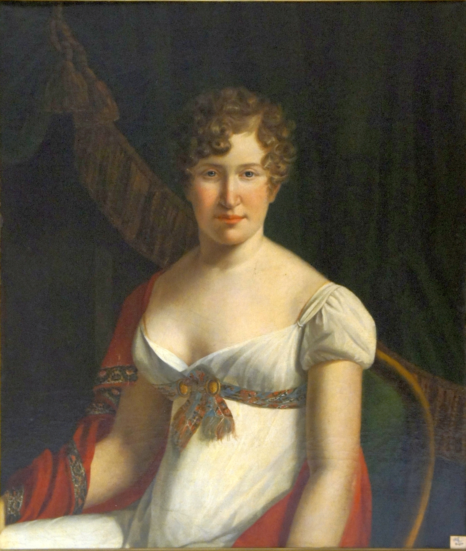 Tableau présentant Augusta fille de George III